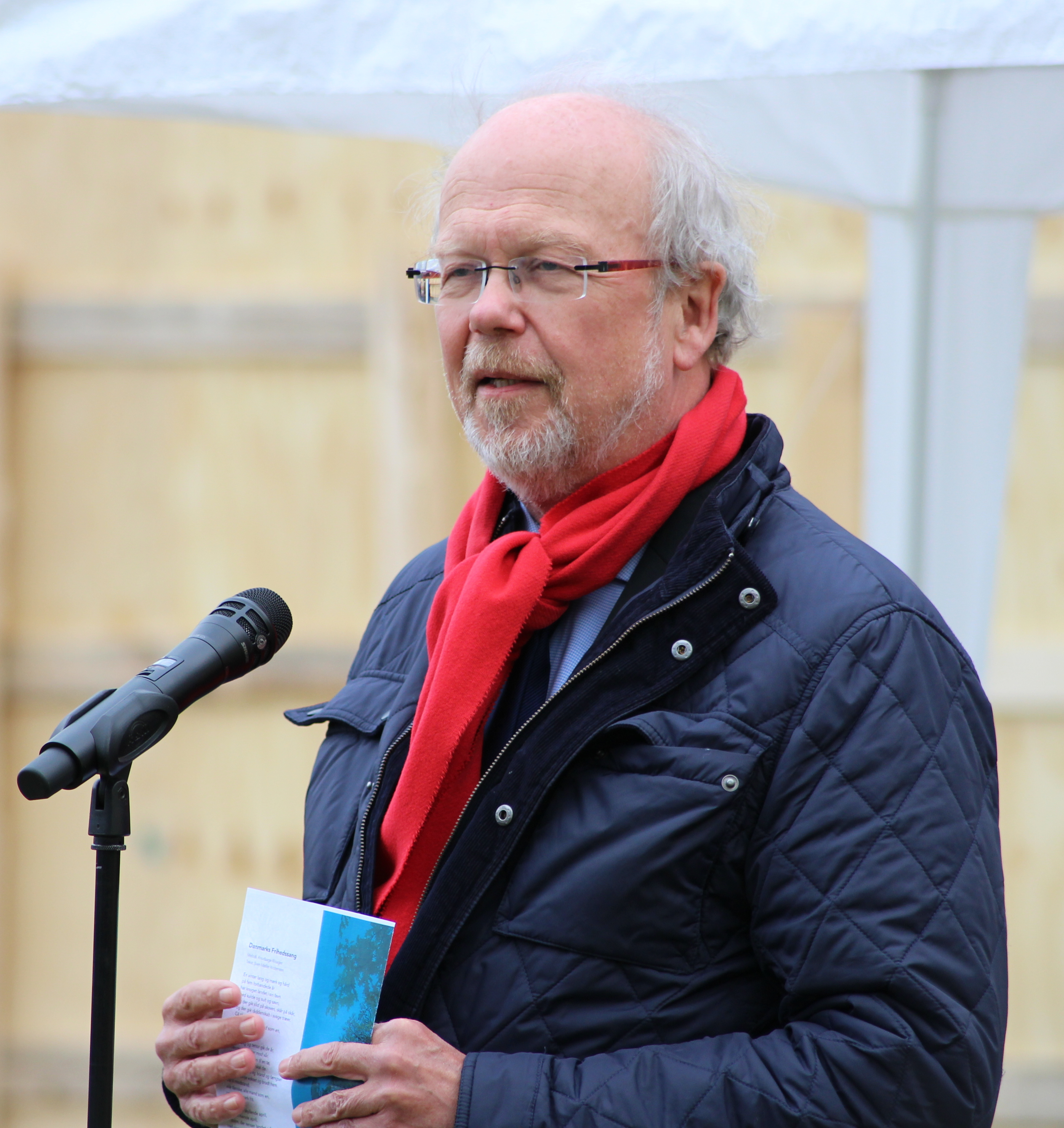 Per Kristian Madsen ved først spadestik til Frihedsmuseet, 4. maj 2017